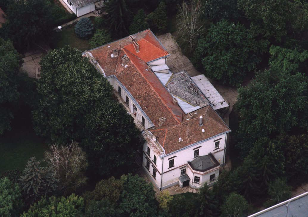 Balkány - Hungary - Europe